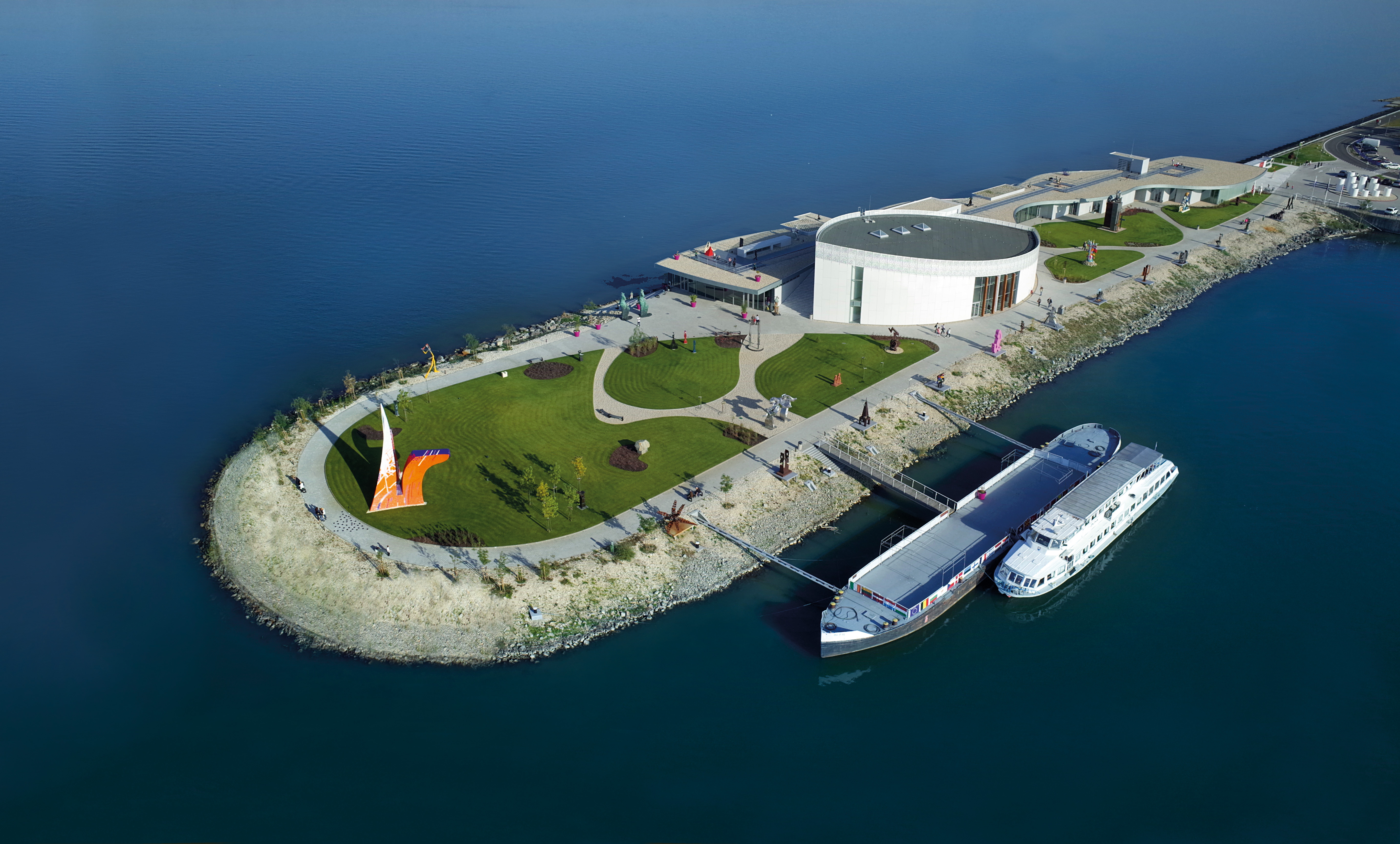 Dnešný pohľad na polostrov a novú budovu Danubiany.